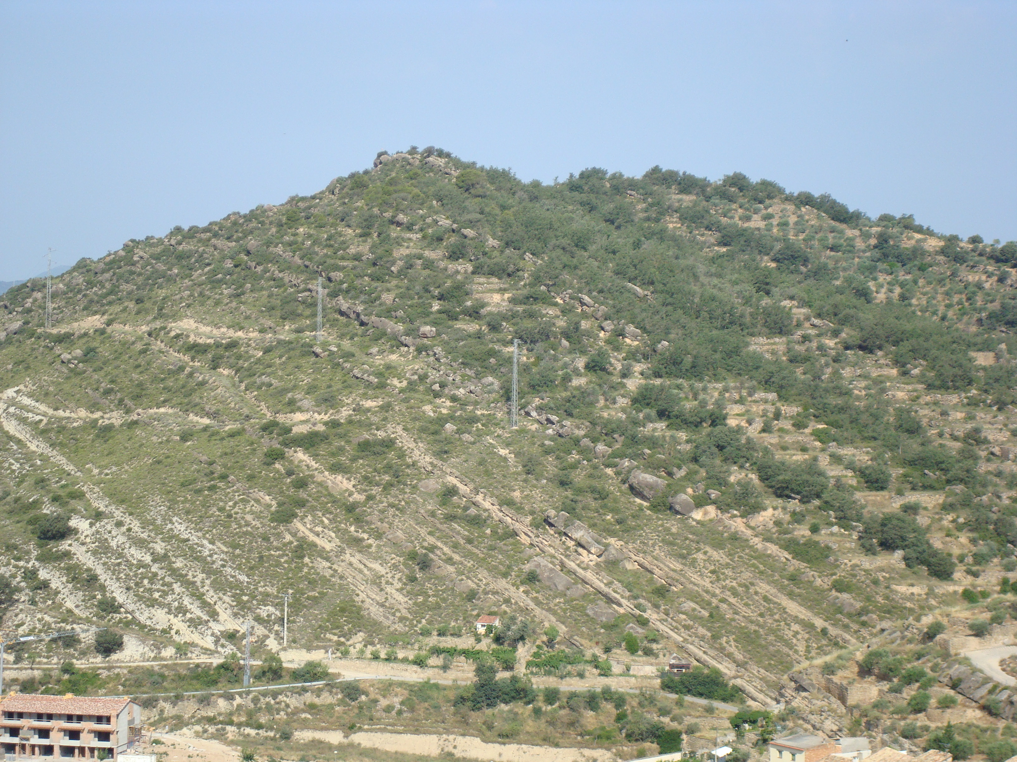 Muntanya de Rocabandera